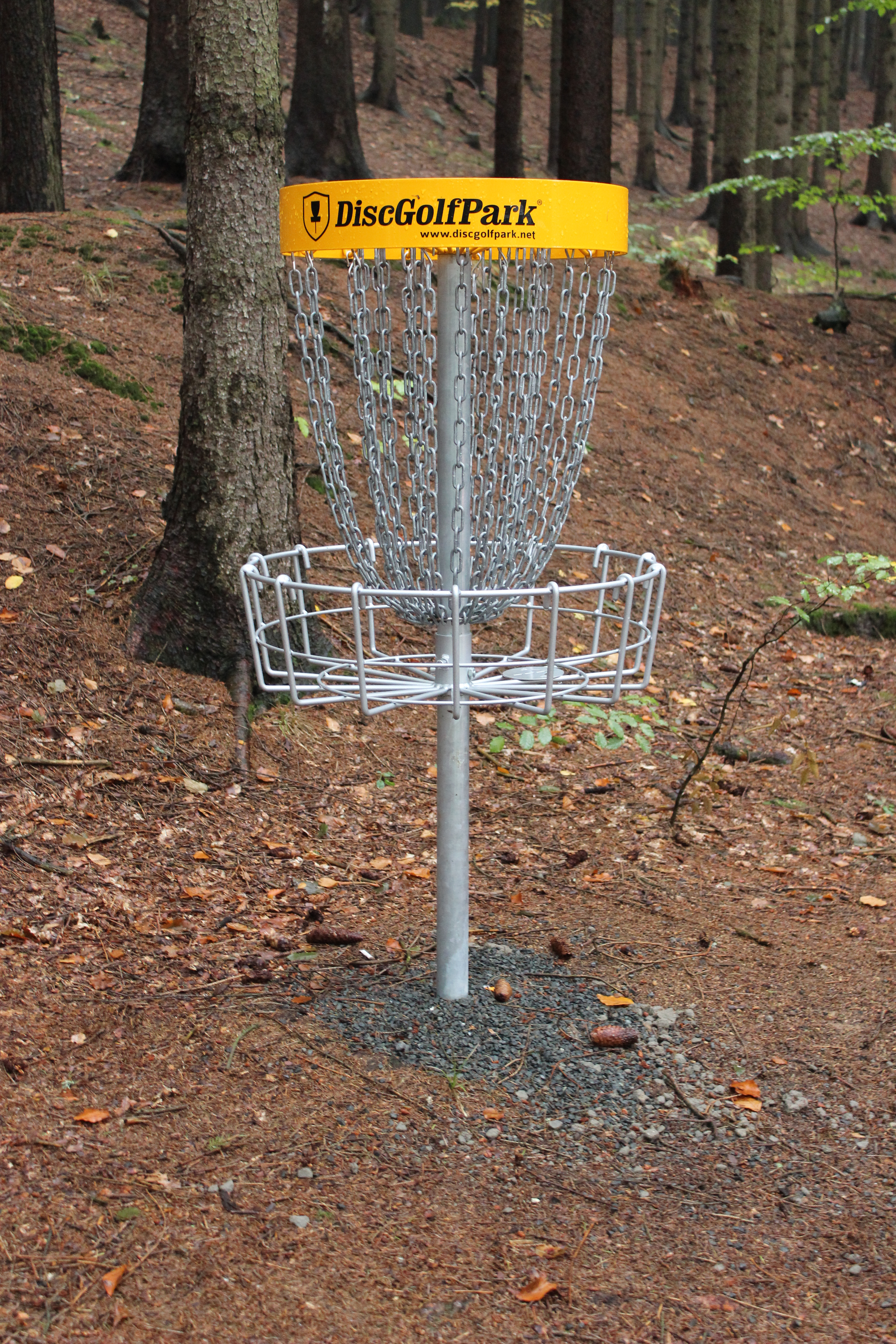 Diskgolf u hotelu Luna v Koutech, v okrese Havlíčkův Brod.